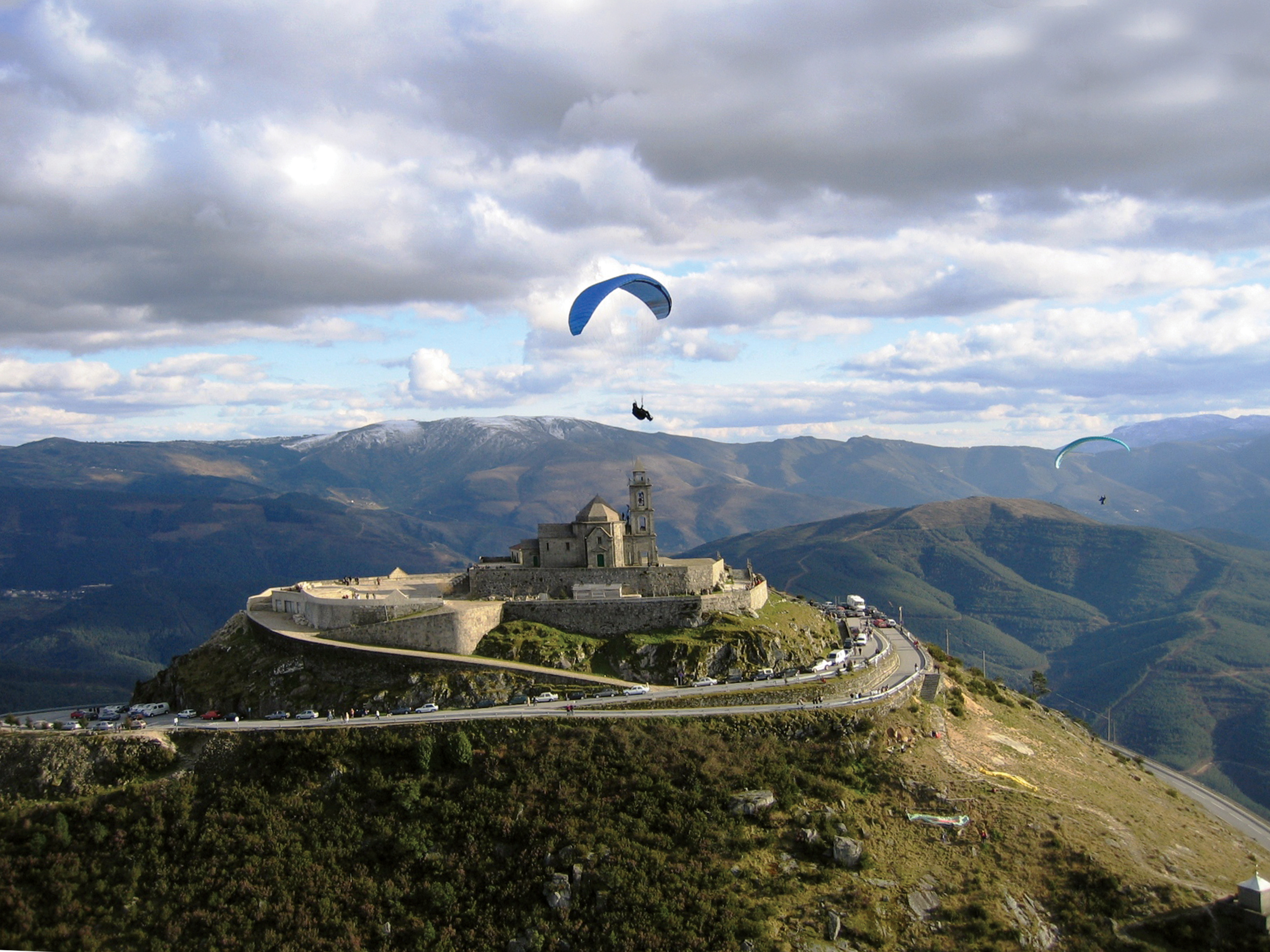 O Monte Farinha eleva-se, a um altitude de cerca de mil metros, ostentando no topo a venerada ermida de Nossa Senhora da Graça.